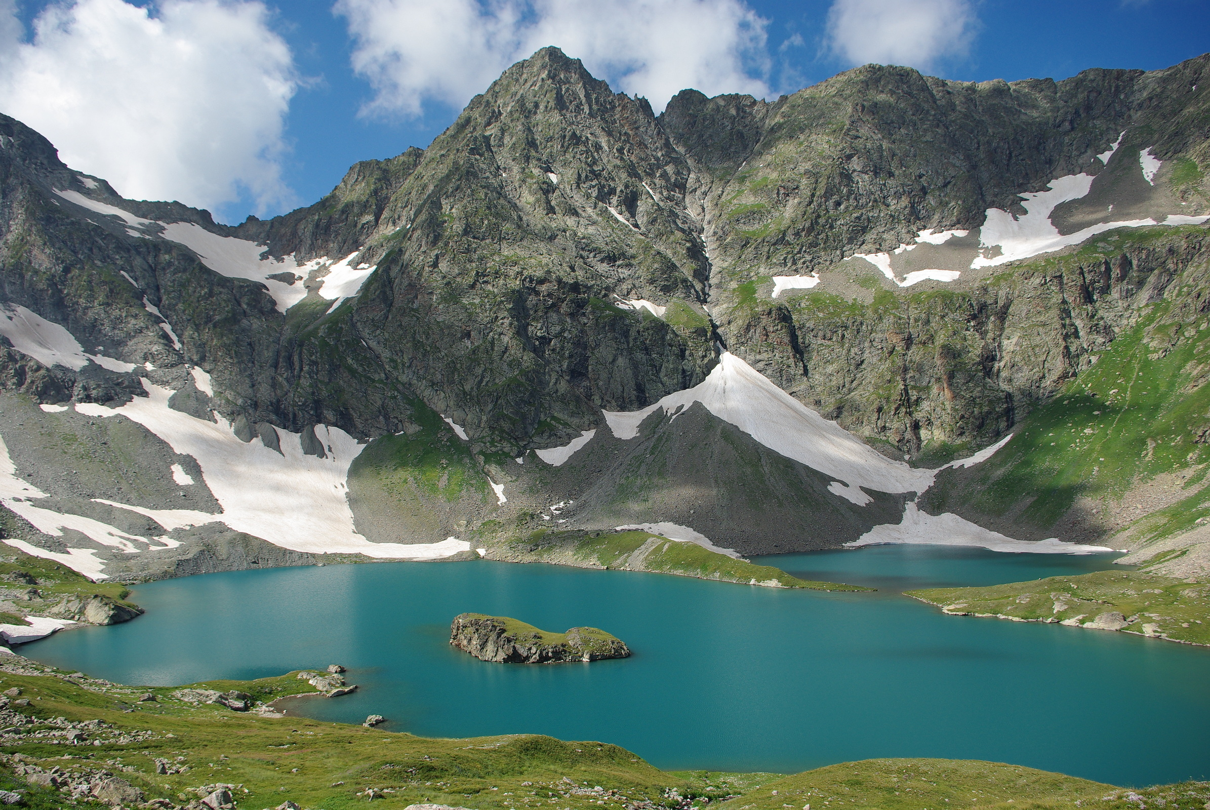 Кавказский заповедник, Урупский район, озеро Безмолвия (большое Имеретинское) This image is related to the protected area of Russia number 0900057